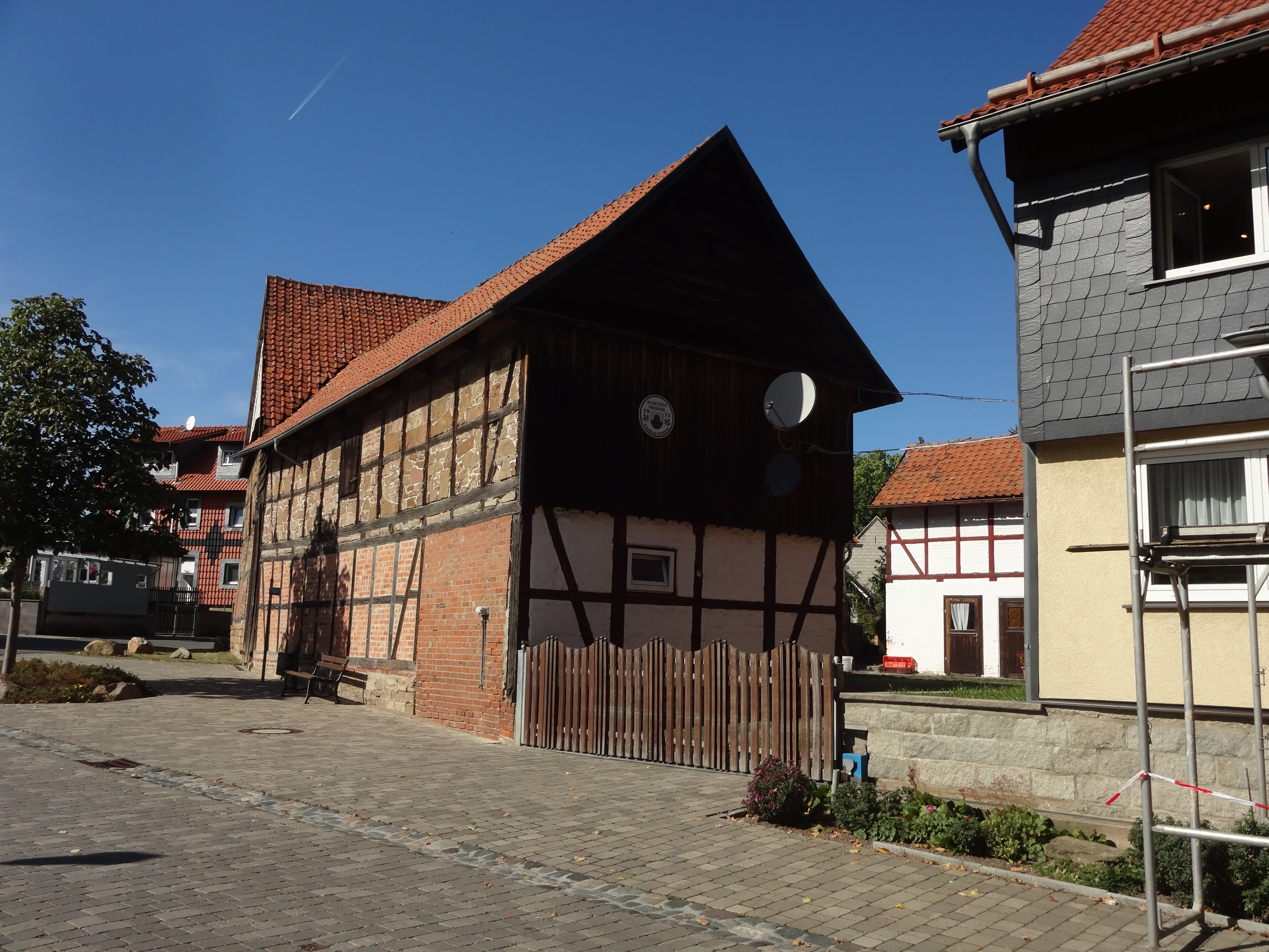 Hauptstraße 6 in Drübeck; das Wirtschaftsgebäude ist denkmalgeschützt